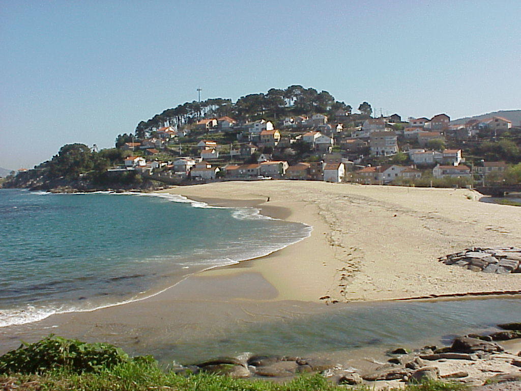 Praia de Loira, vista desde un dos seus lados. Concello de Marín.